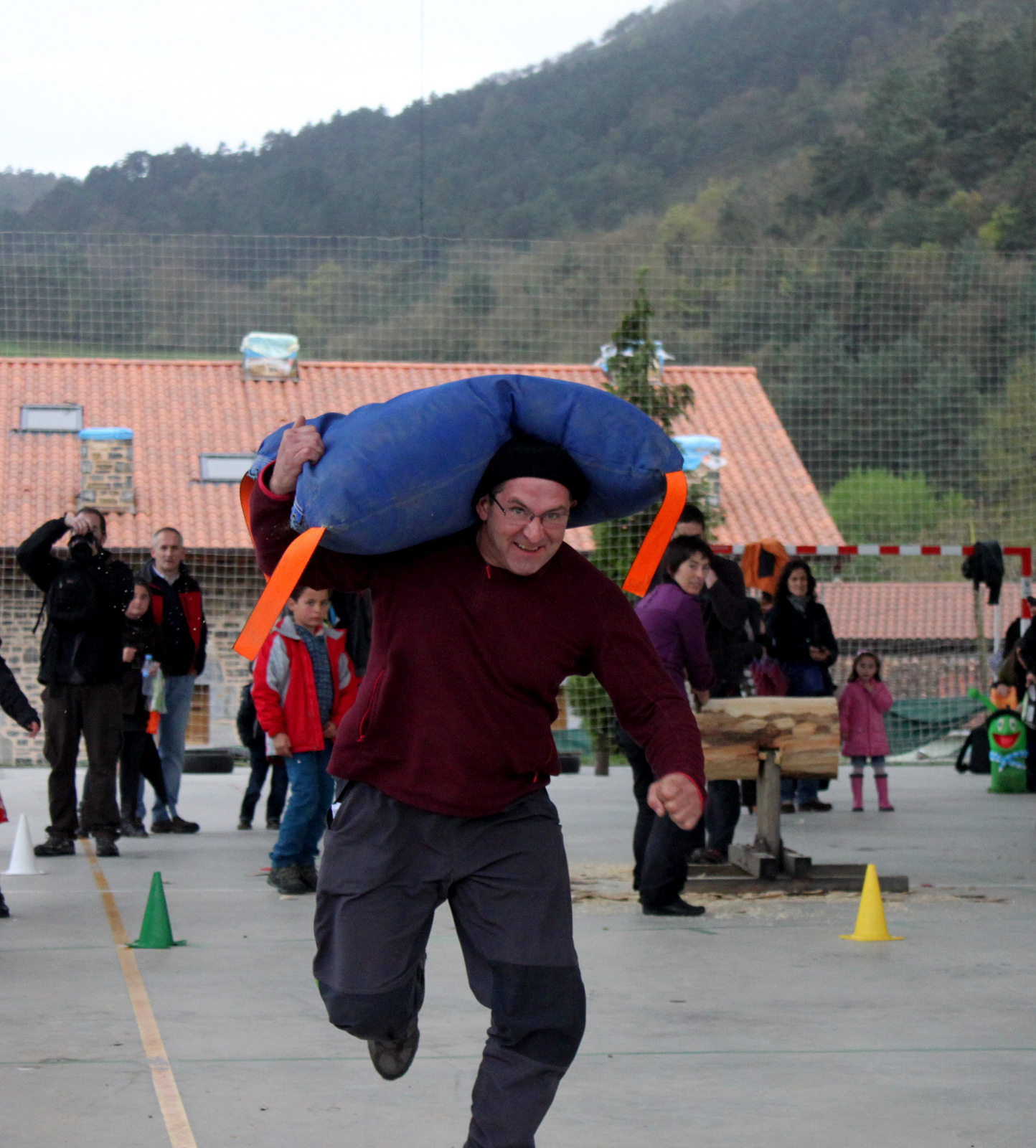 Zaku eramatea.